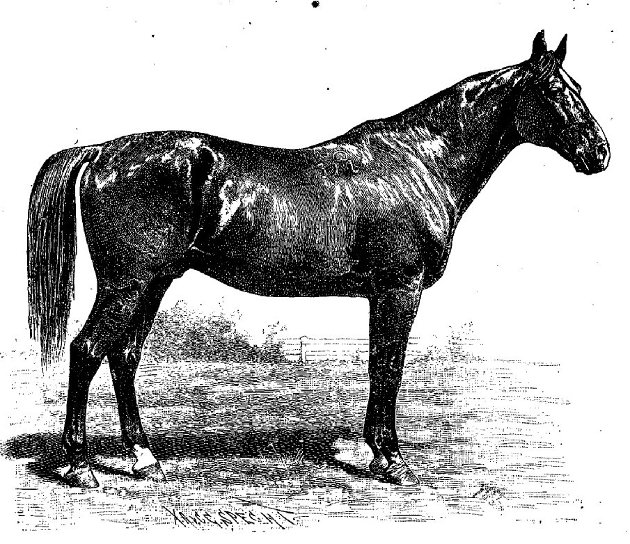 Gidran XXXIX. Type du groupe Gidran de Mezőhegyes